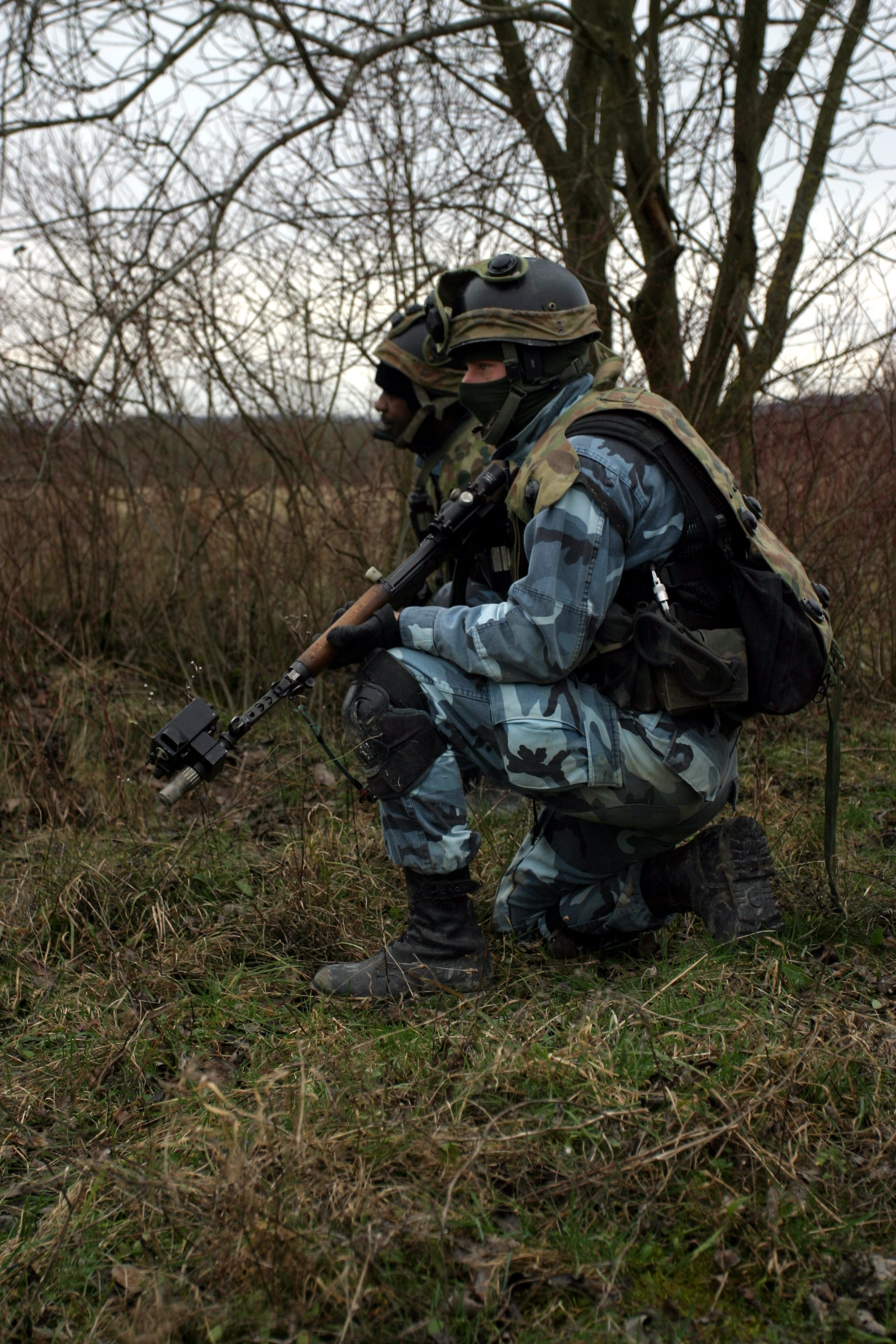 Photo d'un élément de la FORAD (Force adverse) au Centre d'entraînement au combat en zone urbaine de Sissonne en France(cch prouveur)